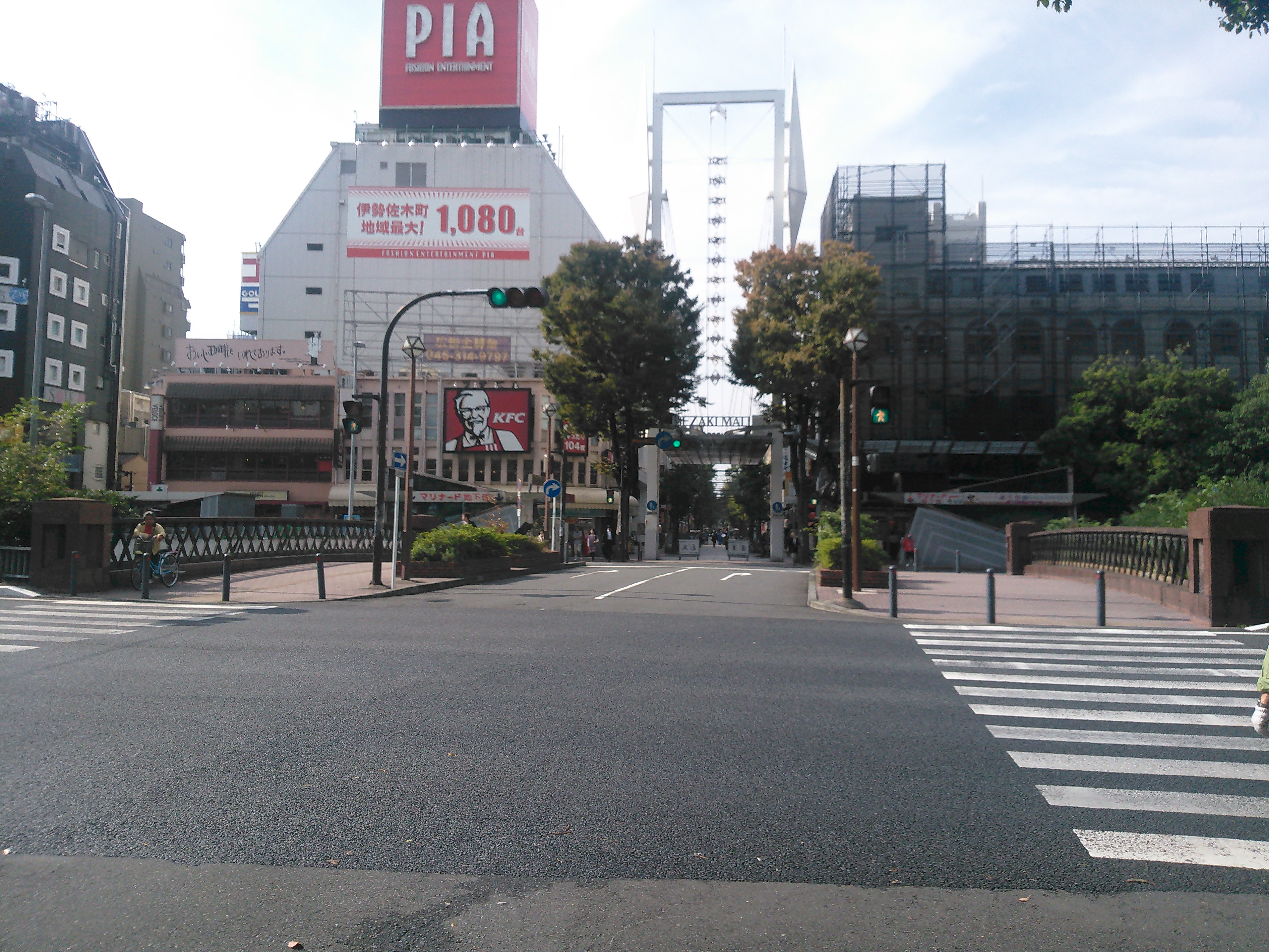 横浜市中区、吉田橋